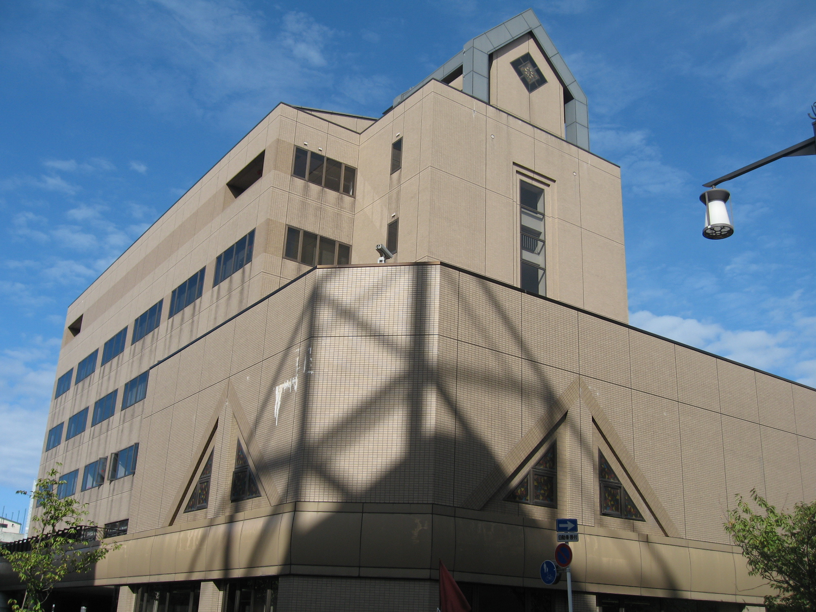 万代市民会館の画像。